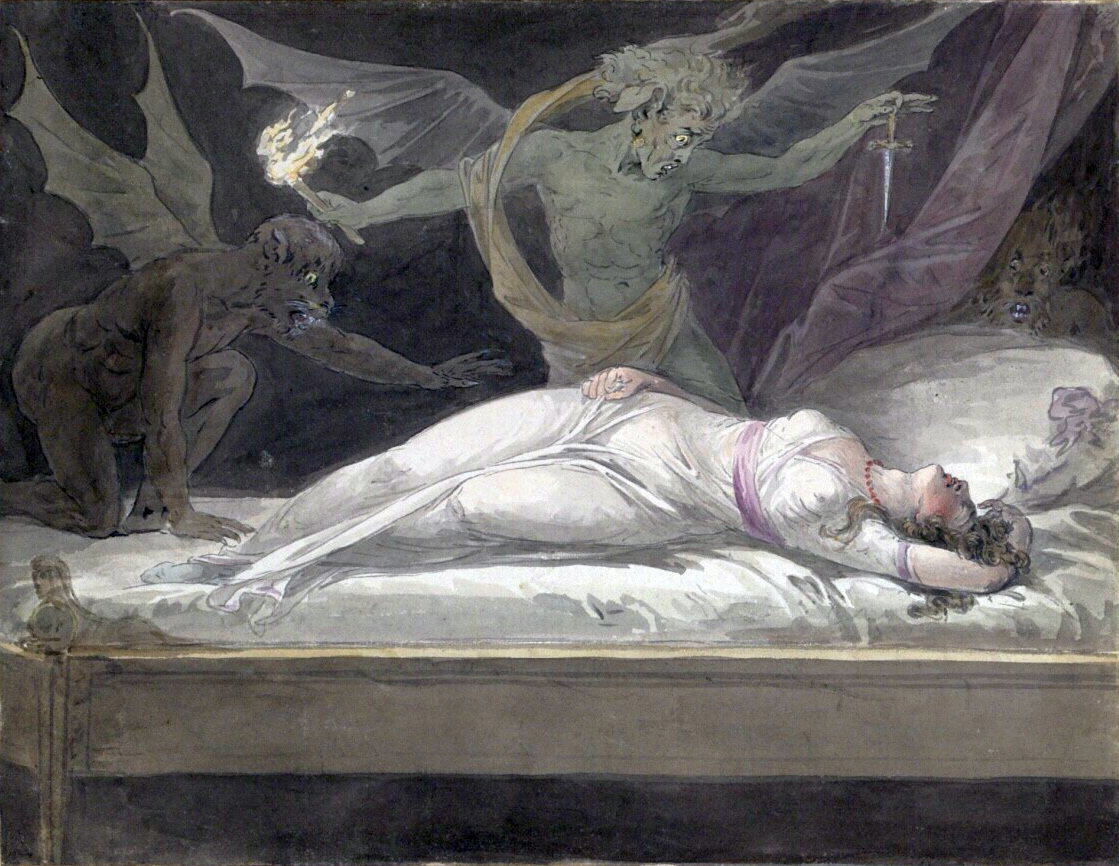 Incubus, coloured aquatint, 1870